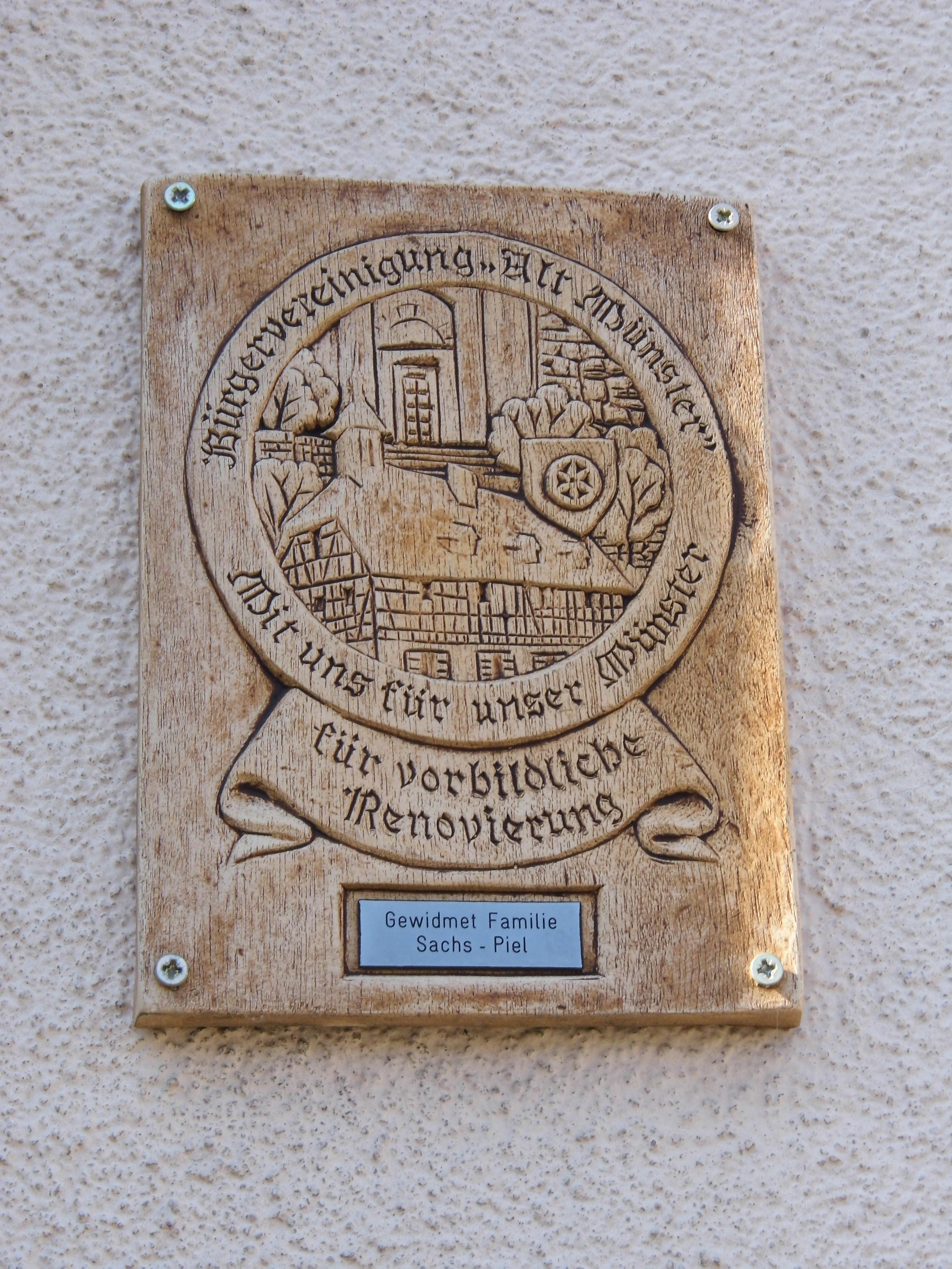 Kelkheim-Münster, Vorbildliche Renovierung